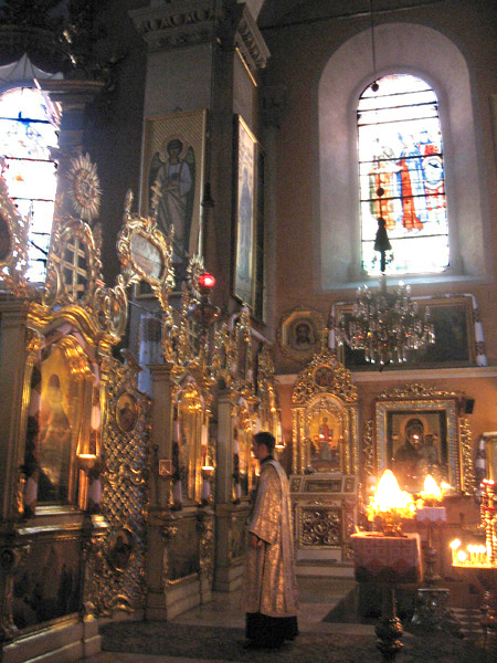 Uspenskaya church inside